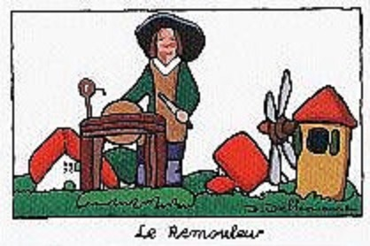 Le remouleur